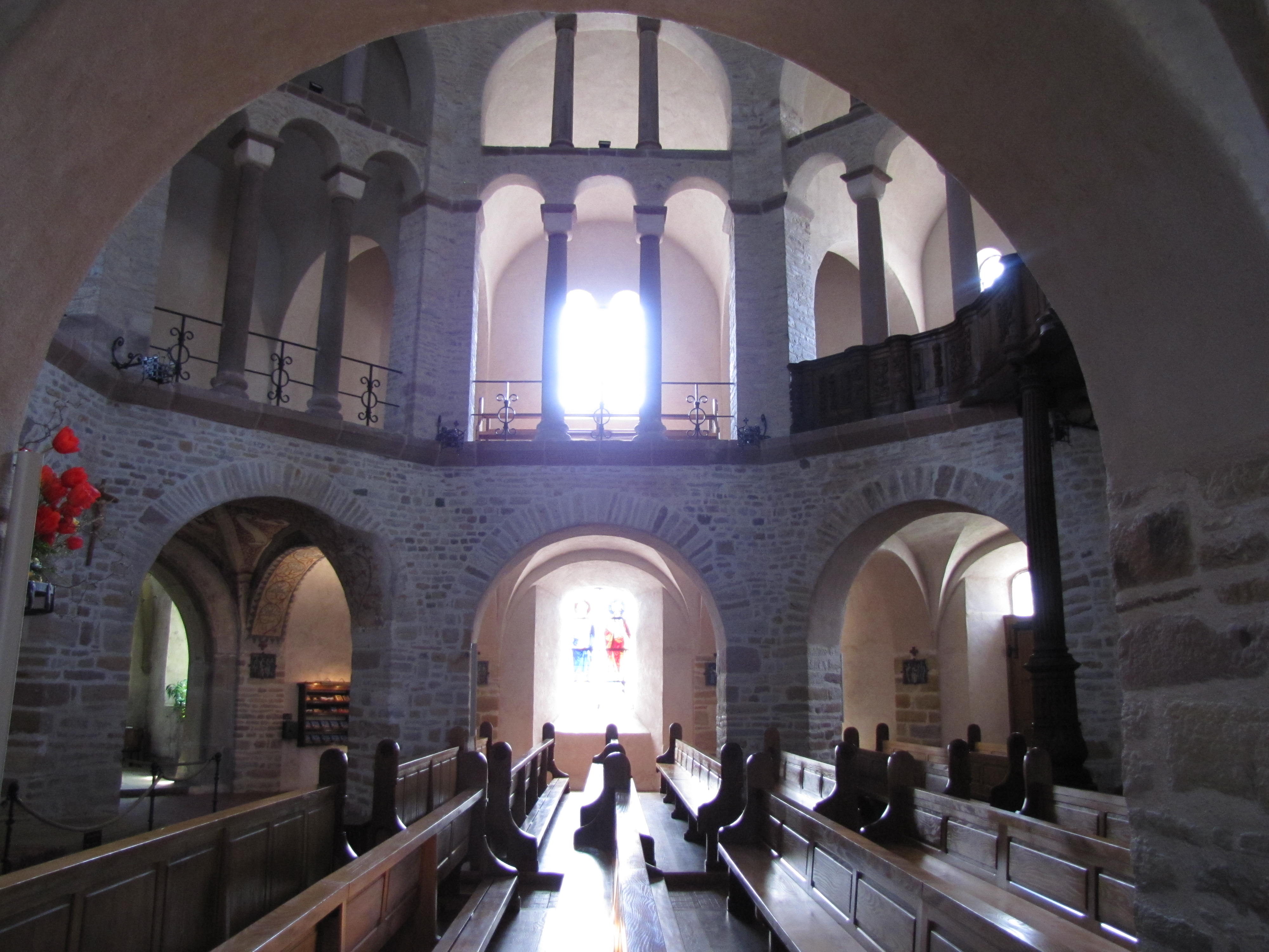 Alsace, Haut-Rhin, Ottmarsheim, Église abbatiale d'Ottmarsheim (PA00085580, IA00096033).